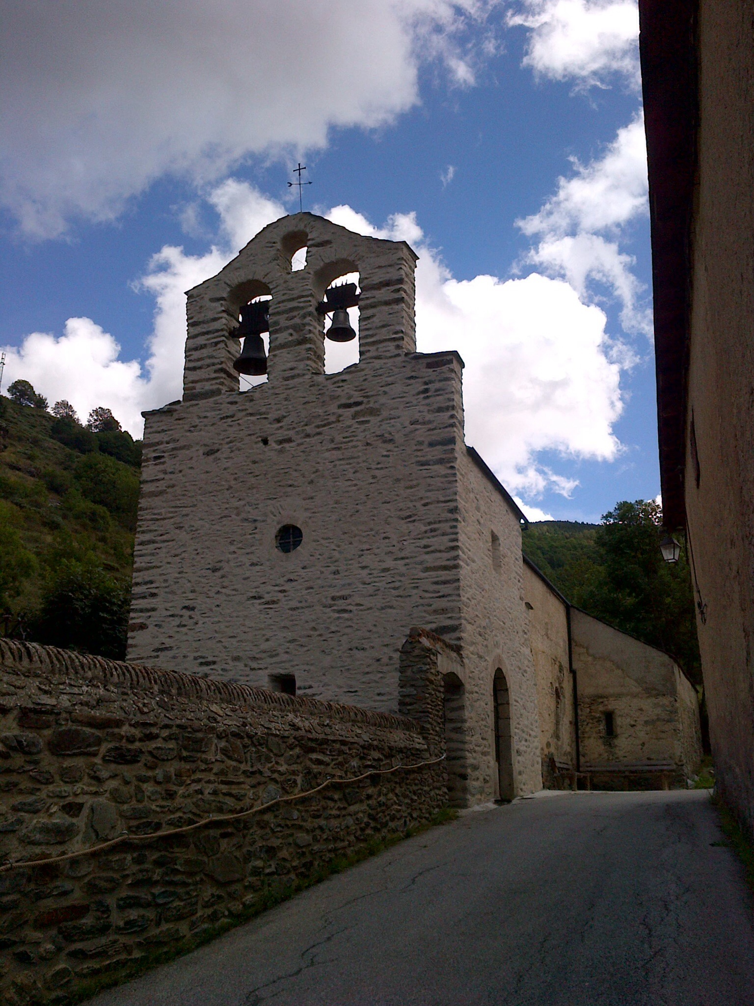 Església de Sant Feliu de Vallcebollera (Alta Cerdanya). El poble, situat a 1 500 m alt, és dominat per l'església parroquial (Sant Feliu), feta de nou al s XIX. El terme comprèn el poble del Puig de Vallcebollera i l'ermita de Sant Bernabé.